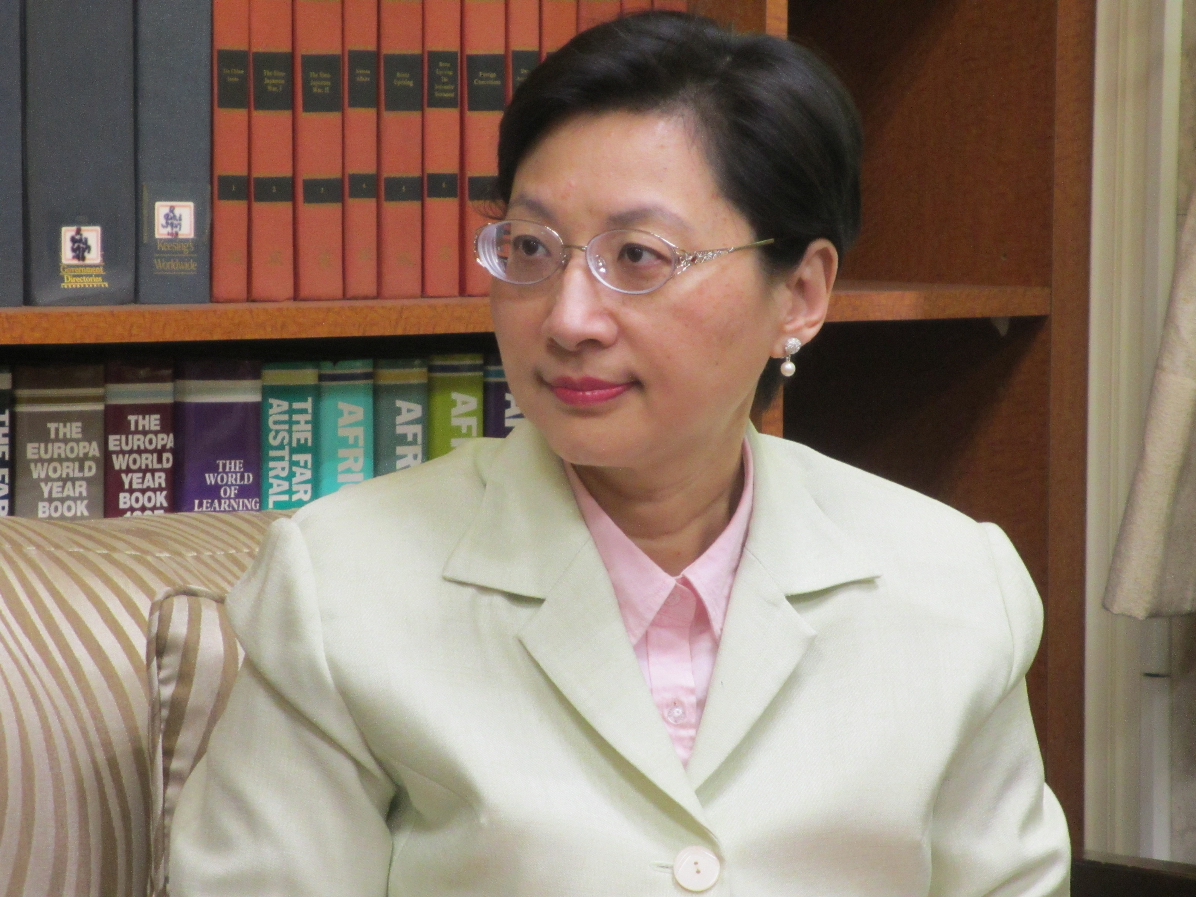 美國法律《台灣關係法》生效35週年，中華民國外交部發言人高安接受美國之音記者訪問。